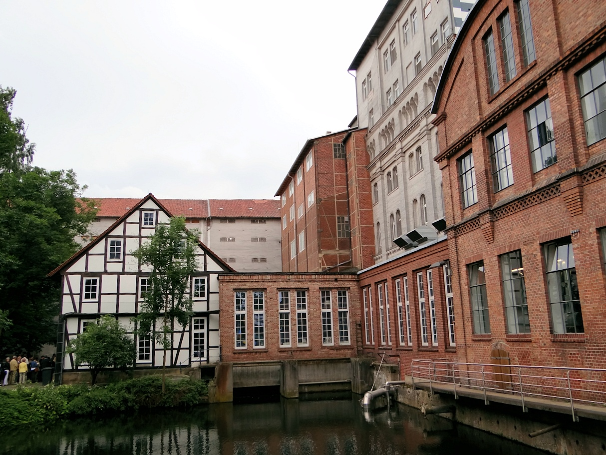 Mühlengelände von Norden mit Alter Mühle, dem Mühlengraben und einem Ensemble von bauten aus den letzten hundert Jahren.